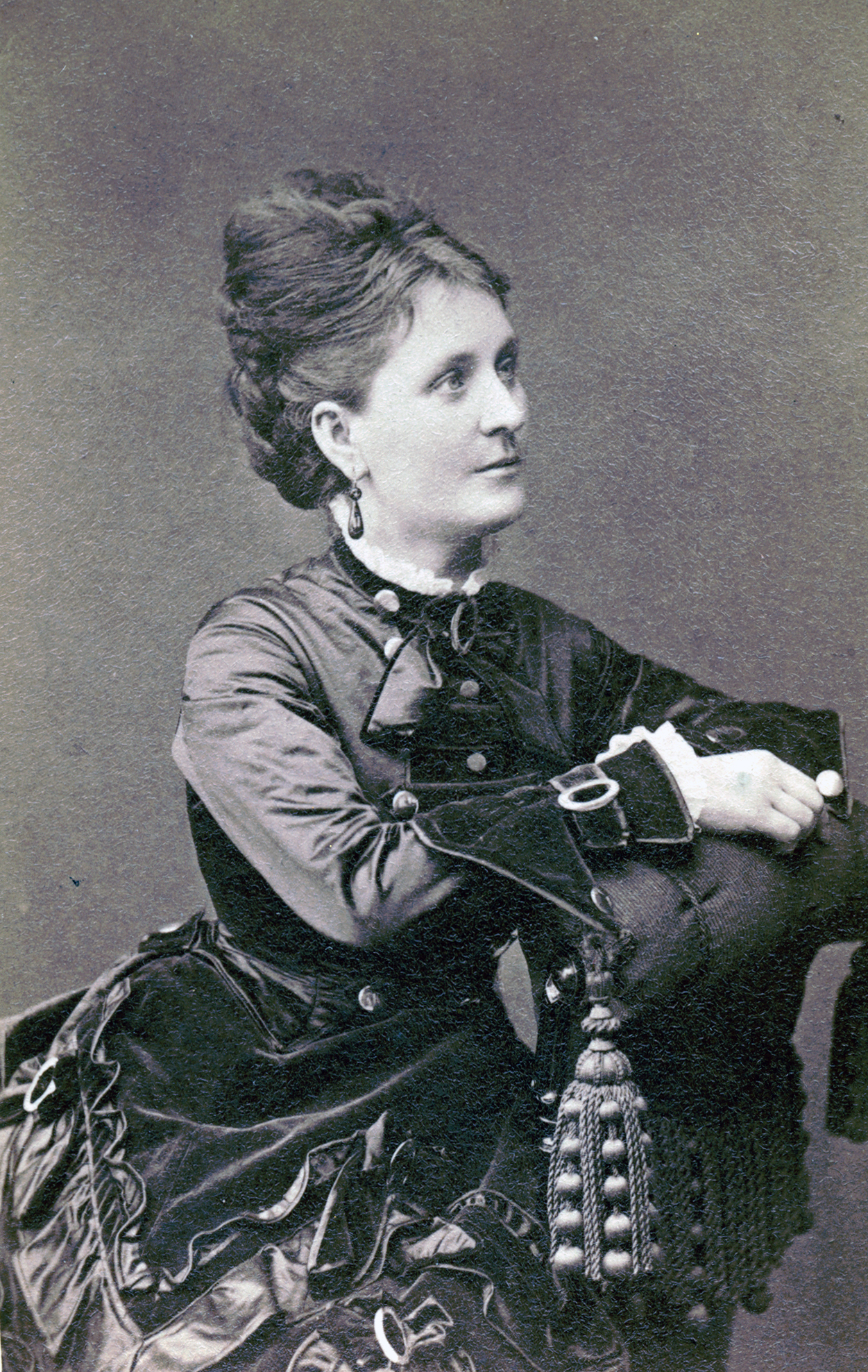 Anna Sandberg, skådespelare vid Kungliga Dramatiska teatern 1870